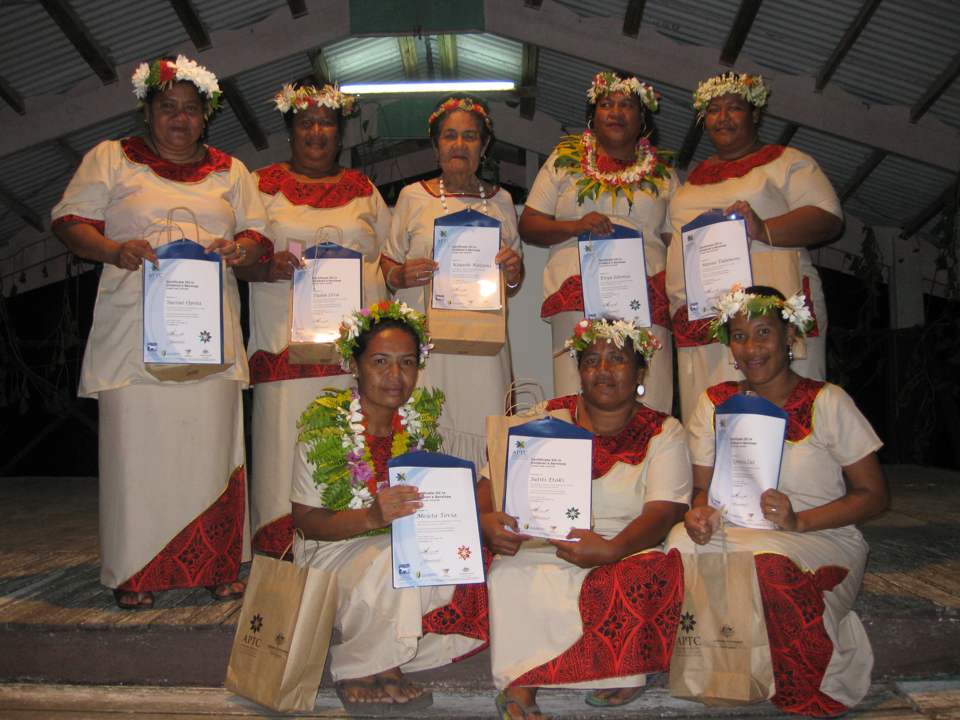 APTC graduation, Tuvulu, 2011.